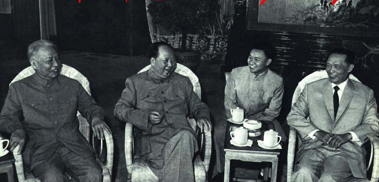 1965-9 1965 刘少奇 毛泽东 越南黄文欢